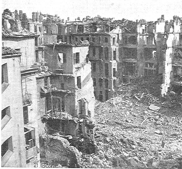 Napoli, abitato bombardato (1940-1943). Autore della foto sconosciuto.